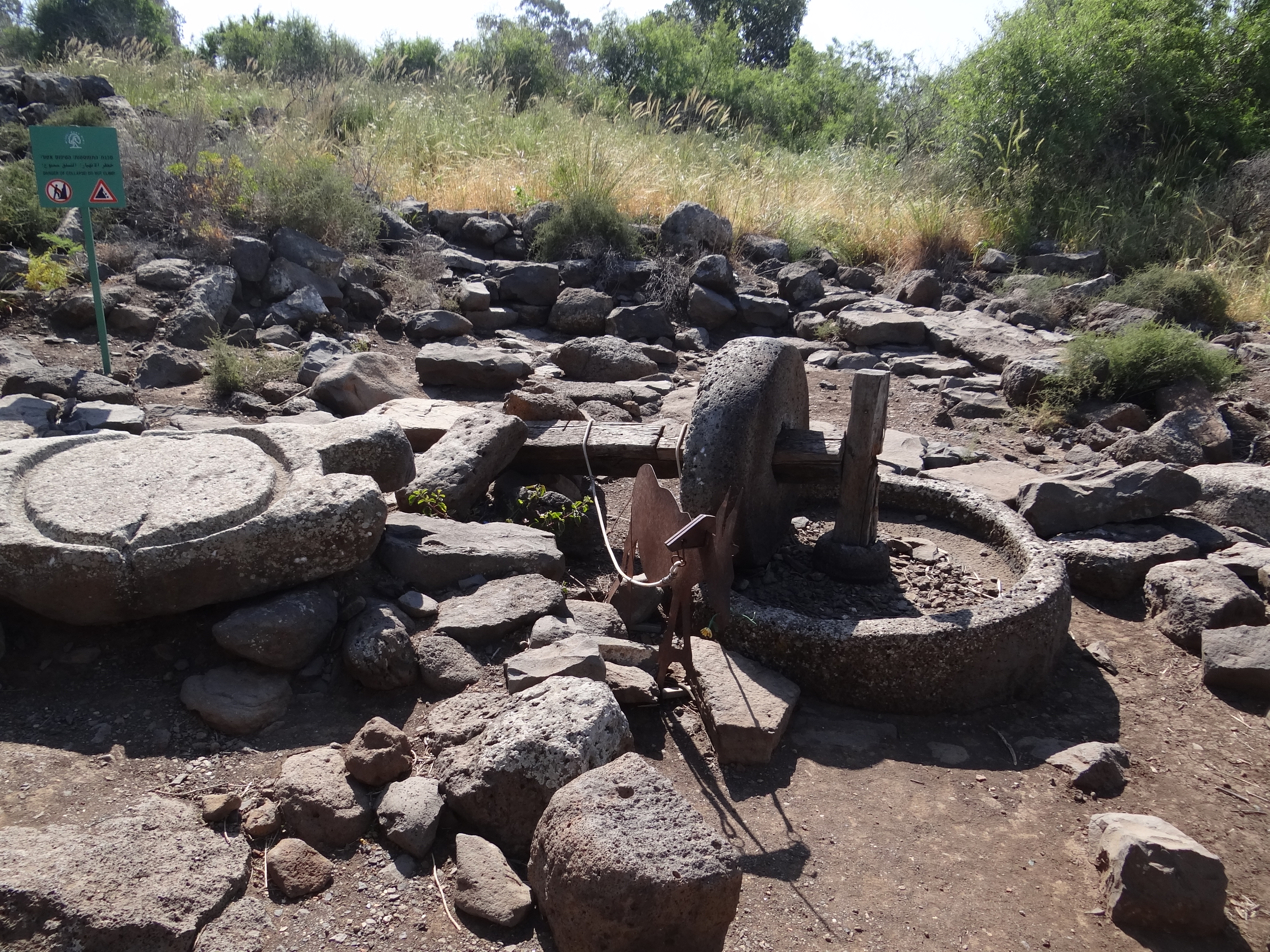 Deir Qeruh, Archaeology site in Golan Heights דיר קרוח - שרידי כפר עתיק הנמצאים בשמורת גמלא שברמת הגולן בית הבד של הכפר מהתקופה הביזנטית